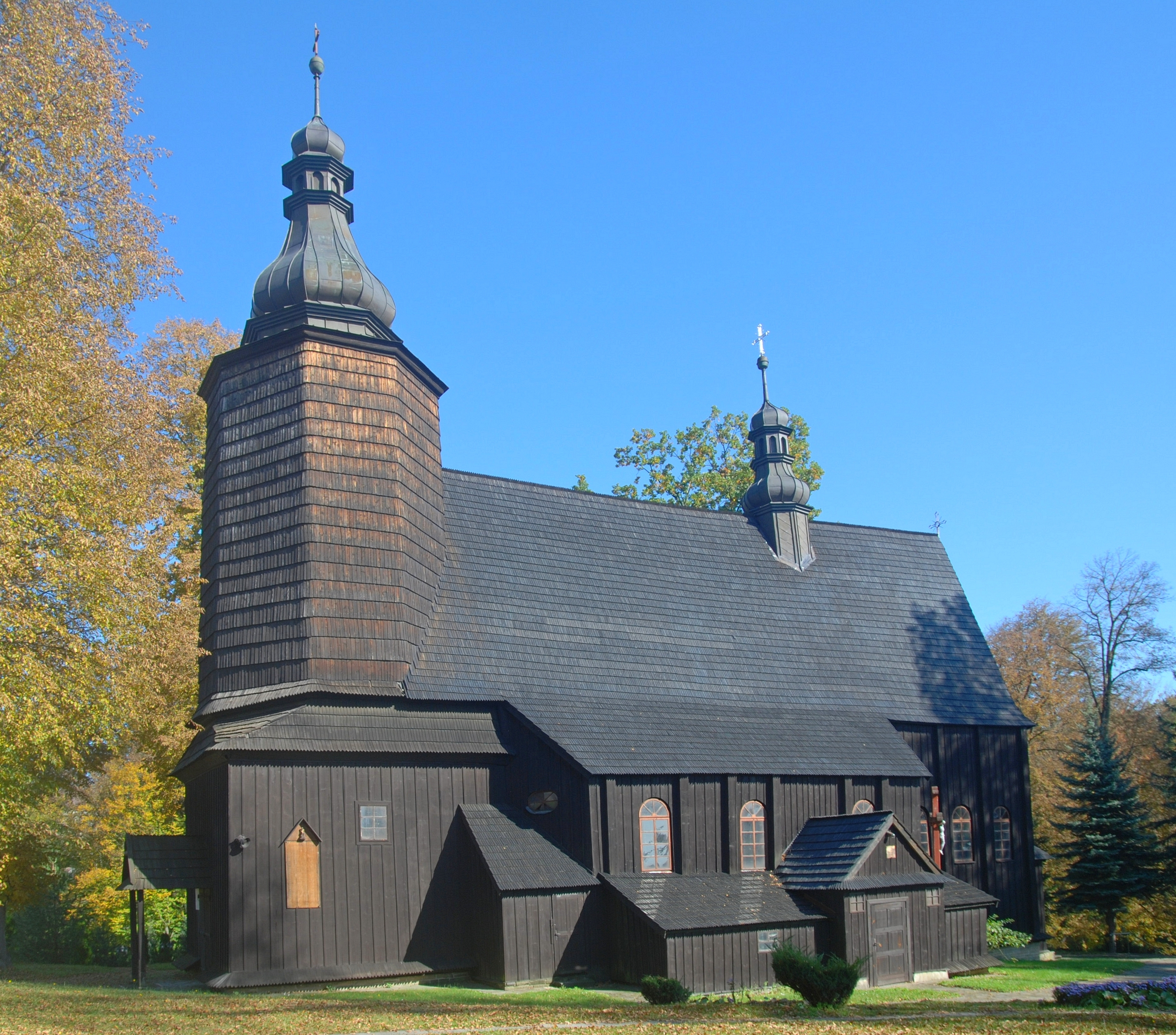 wieś Gromnik